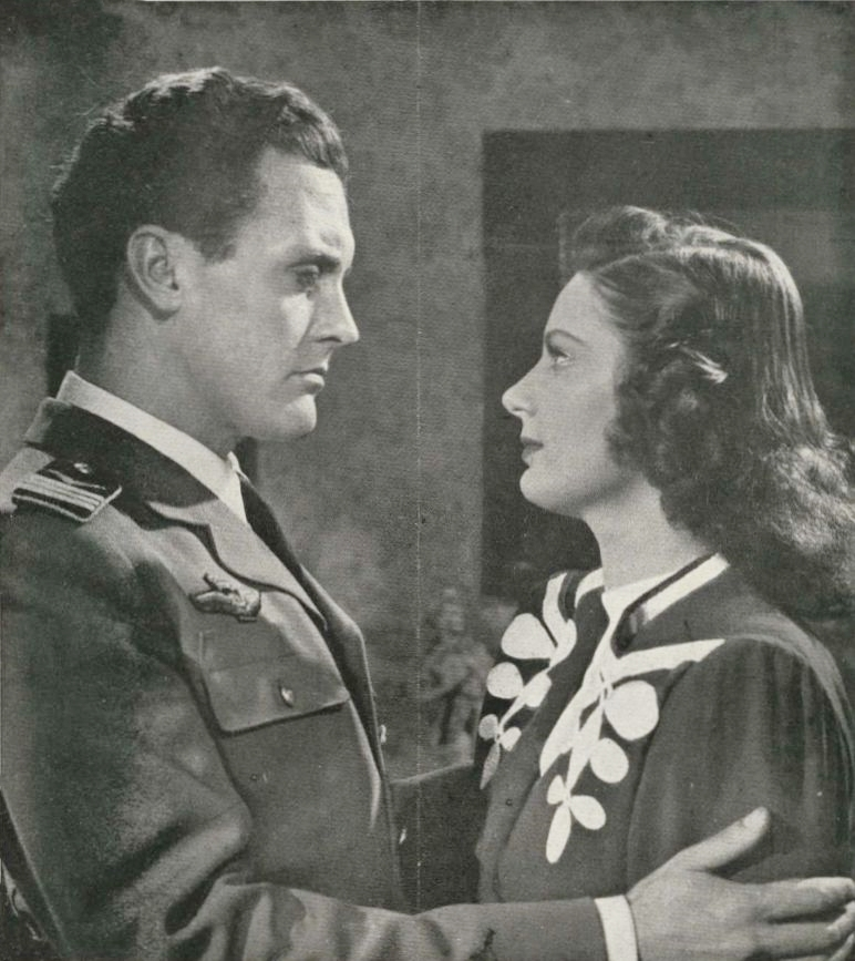 Perényi László és Szemere Vera a Magyar sasok című 1943-as filmben